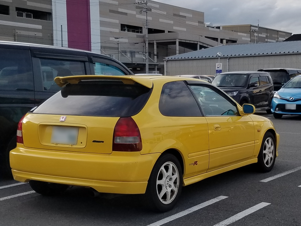 シビック タイプR（後期型）